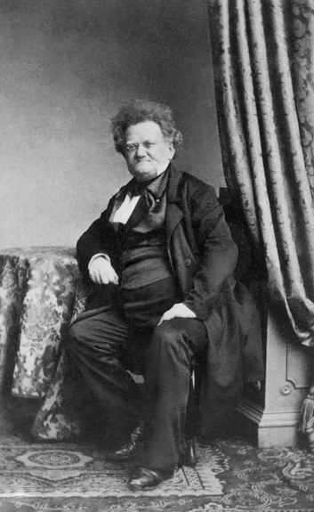 Gabriel Riesser. Hamburg, c. 1856